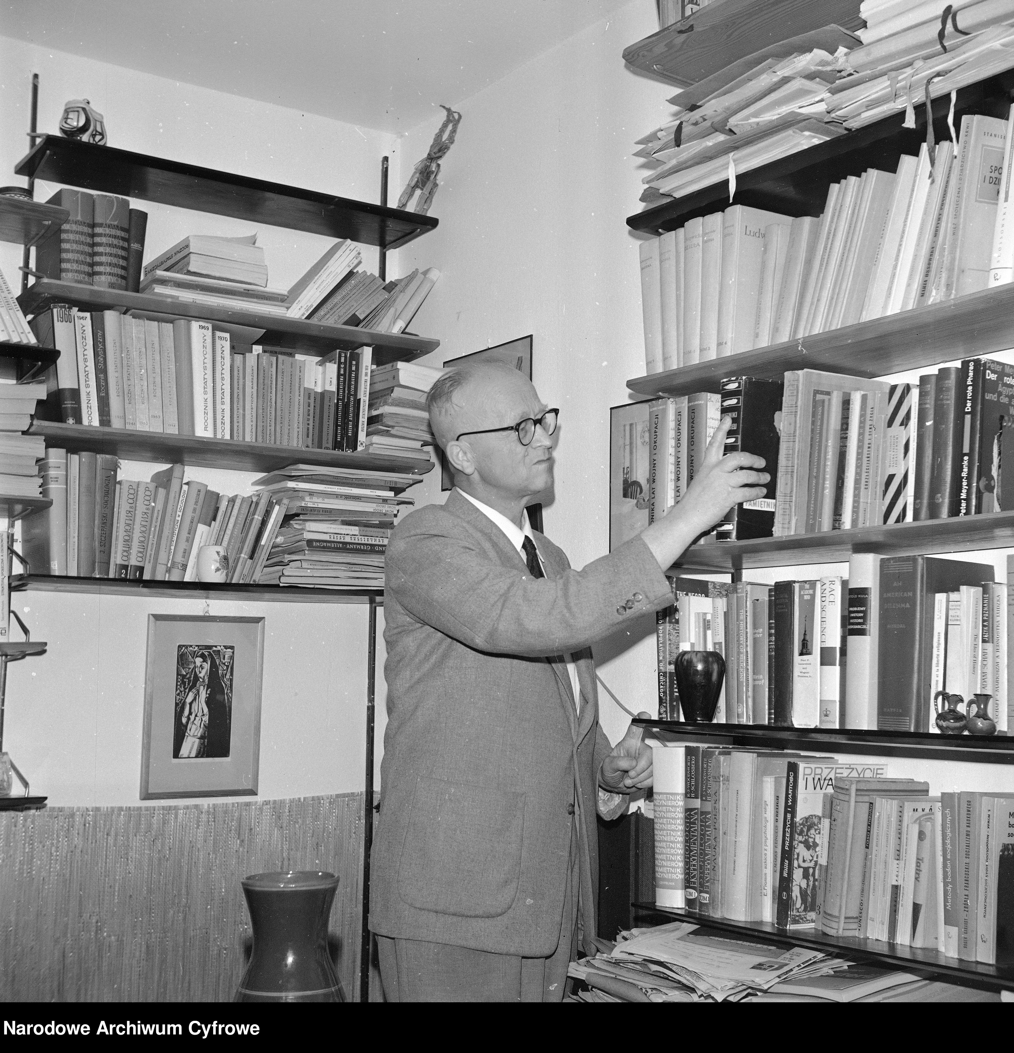 Socjolog prof. Stefan Nowakowski w swoim mieszkaniu w Warszawie (1972)